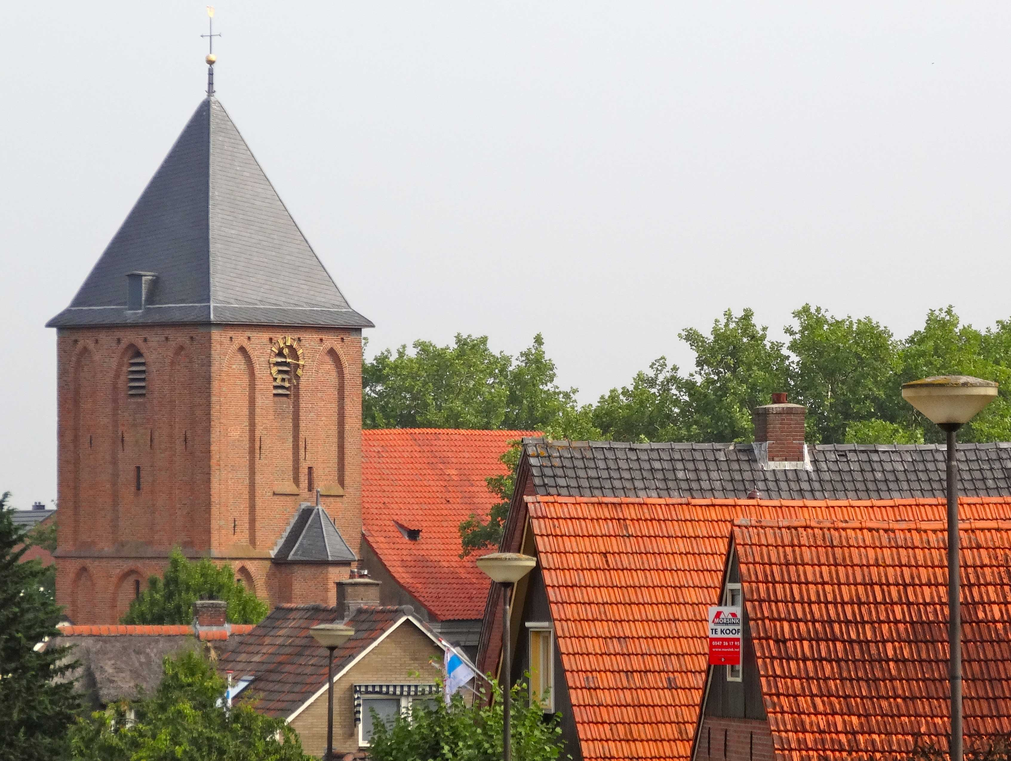 Martinuskerk Markelo